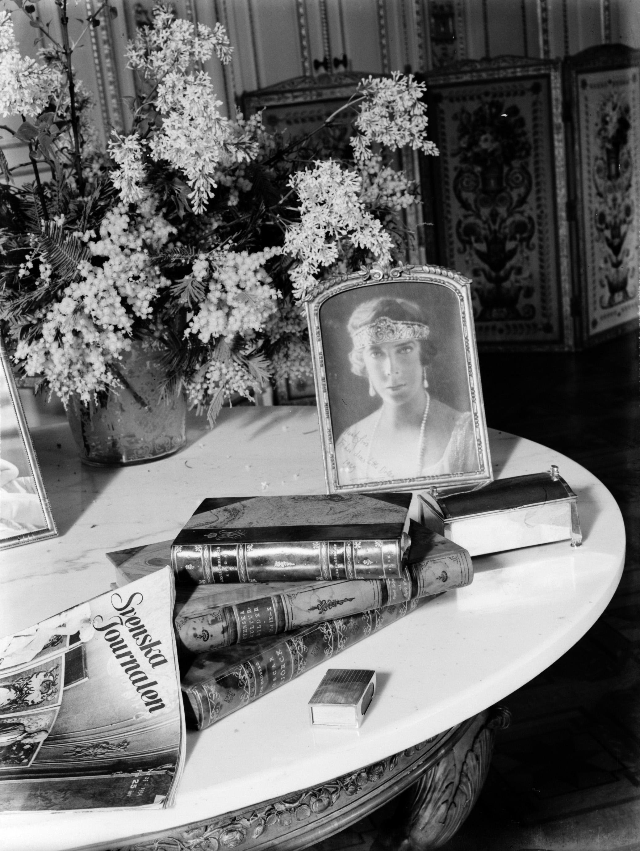 Collectie / Archief : Fotocollectie Van de Poll Reportage / Serie : Koningshuis België Beschrijving : Tafel in het paleis in Laken met daarop boeken, een Zweeds tijdschrift en een ingelijste portretfoto van koningin Elisabeth van Belgié Datum : 1934 Locatie : België, Laken Trefwoorden : boeken, koninginnen, portretten, tijdschriften Persoonsnaam : Elisabeth (koningin-moeder België) Fotograaf : Poll, Willem van de Auteursrechthebbende : Nationaal Archief Materiaalsoort : Glasnegatief Nummer archiefinventaris : bekijk toegang 2.24.14.02 Bestanddeelnummer : 190-0634